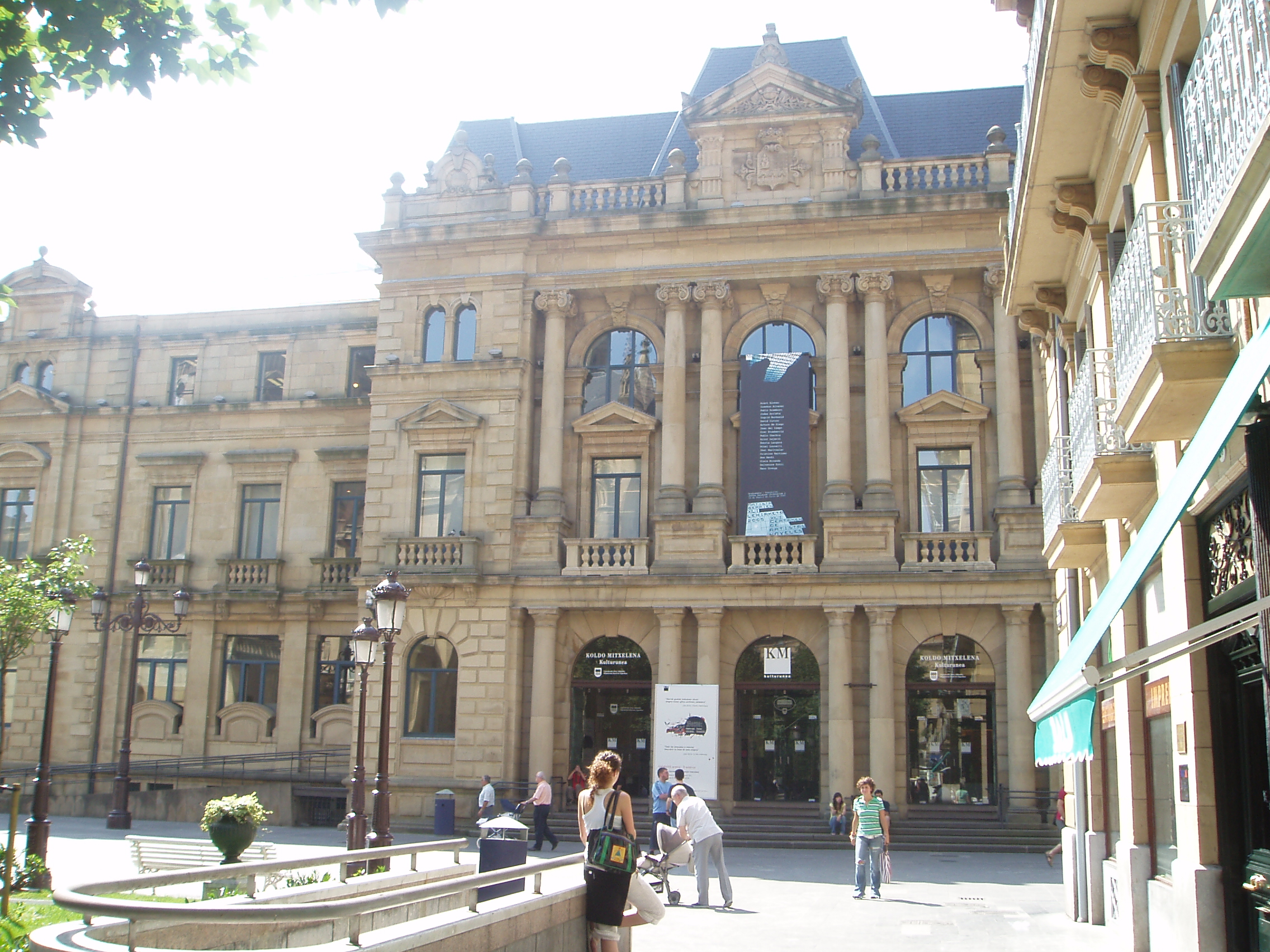 "Casa de la cultura Koldo Mitxelena de San Sebastian(Guipúzcoa)."